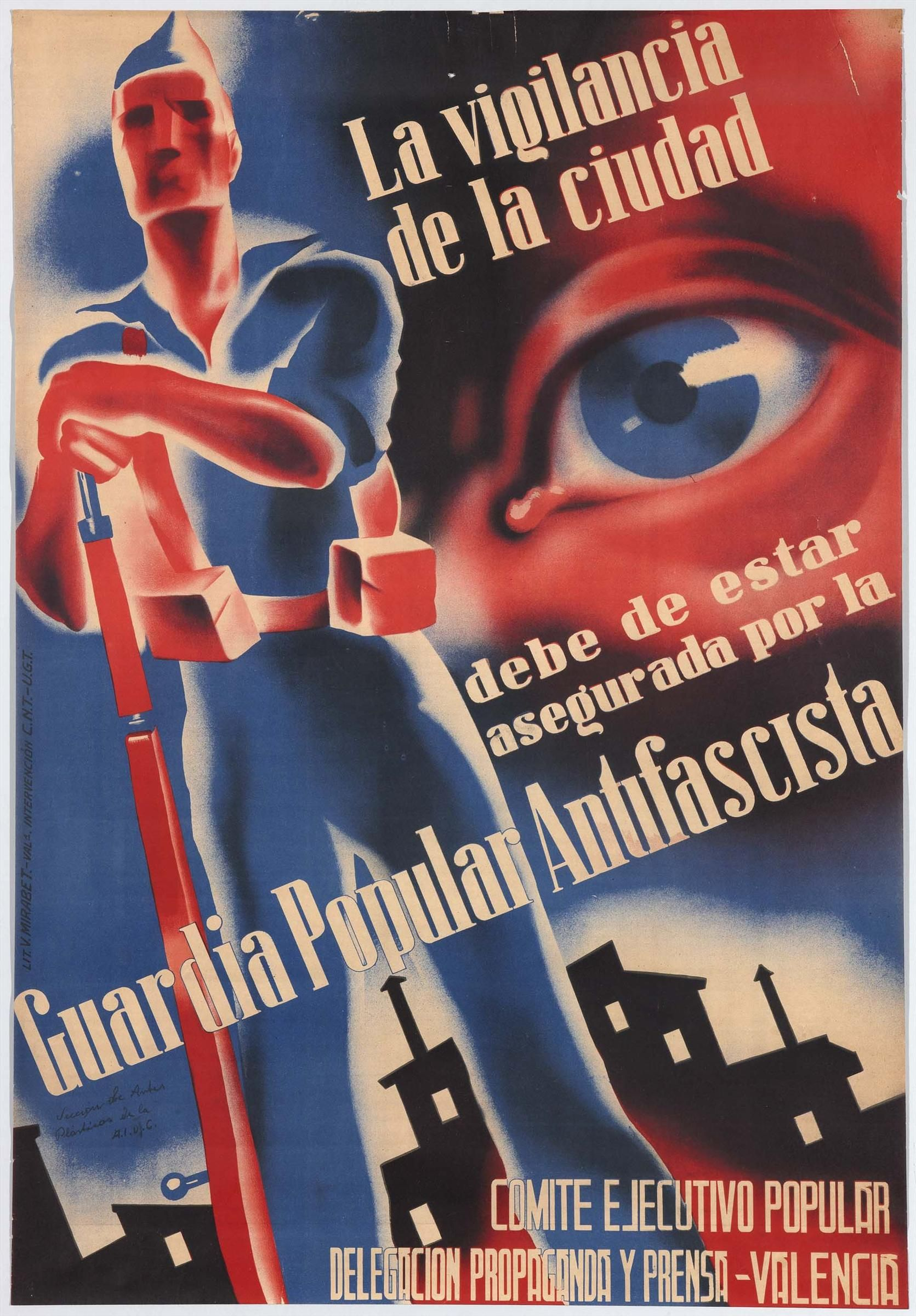 La vigilancia de la ciudad debe de estar asegurada por la Guardia Popular Antifascista, cartel de autoría desconocida, publicado entre 1936 y 1937. Pertenece a la colección del Museo Nacional Centro de Arte Reina Sofía (Madrid, España).